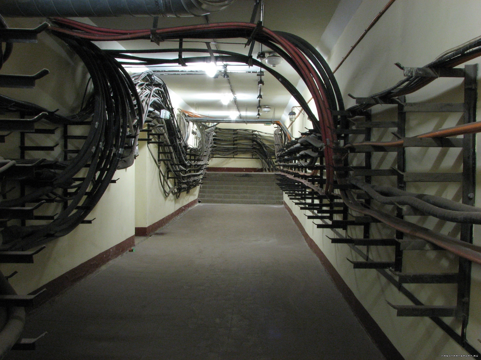 Служебная платформа (эвакуационный выход) Д Арбатско-Покровской линии Московского метрополитена. Кабельный коллектор.